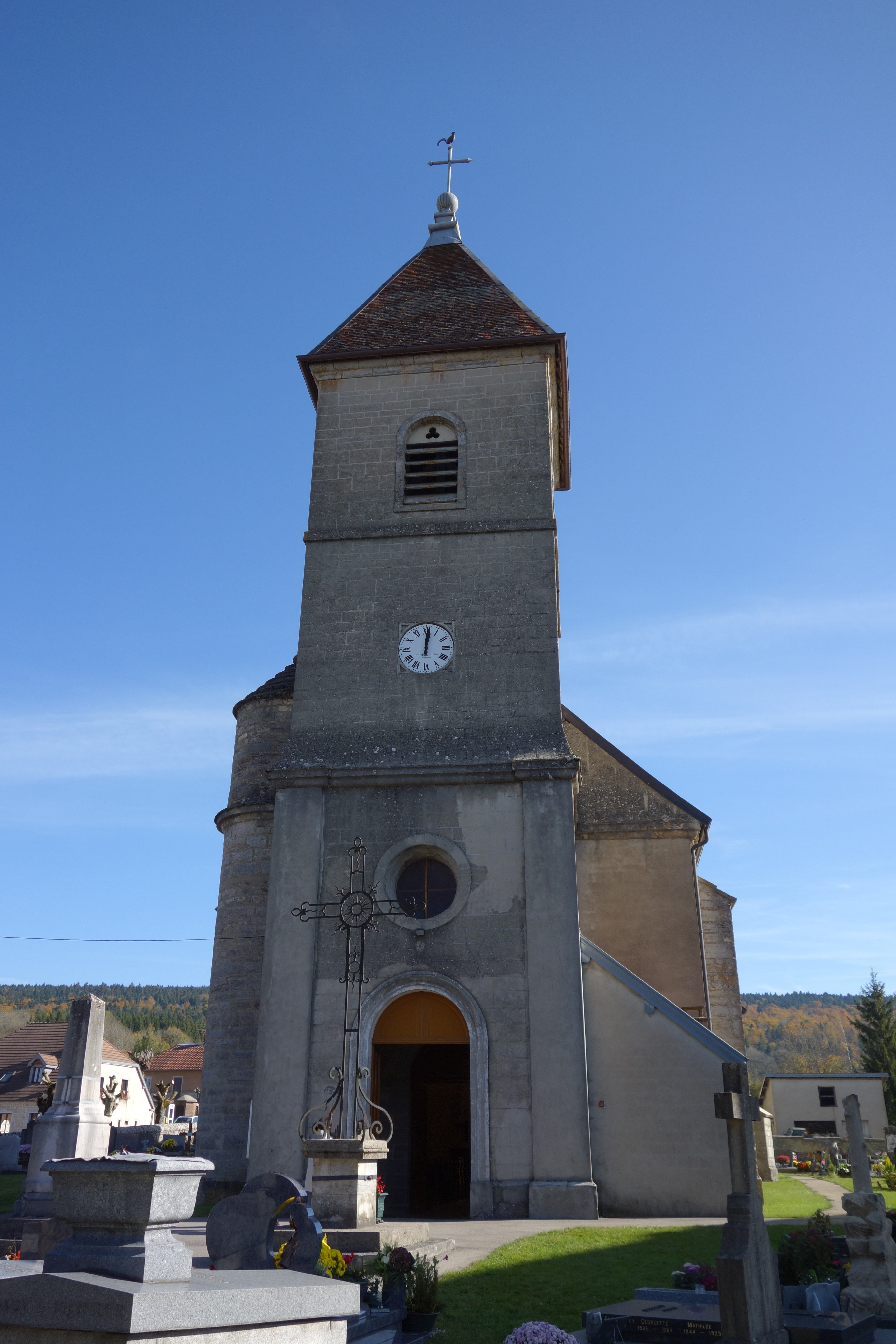 Saint-Germain-en-Montagne (Jura) façade de l'église